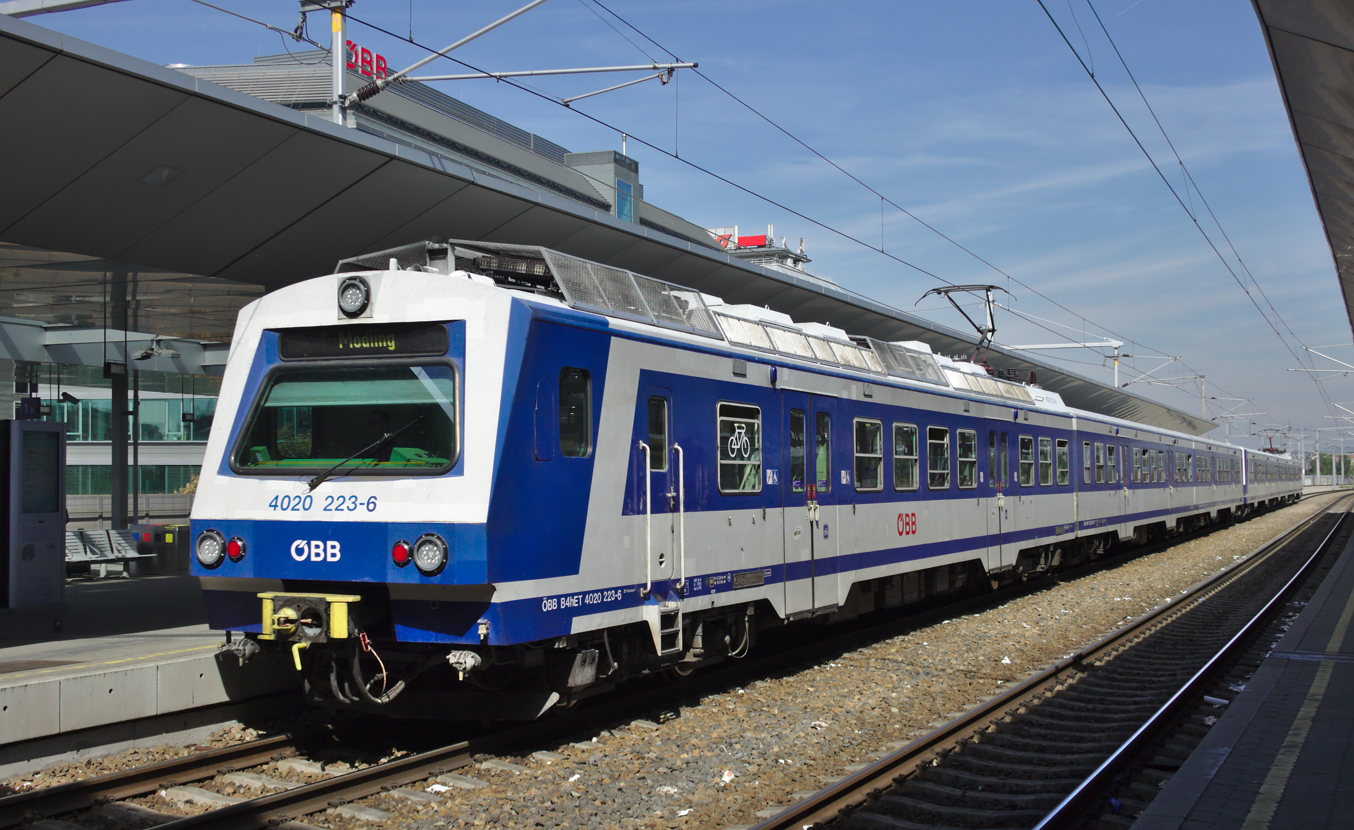 S-Bahn-Zug Richtung Mödling bestehend aus 4020 223-6 und einem weiteren 4020er fährt auf Bahnsteig 2 des Bahnhofs Wien Praterstern ein, Blick von Bahnsteig 3